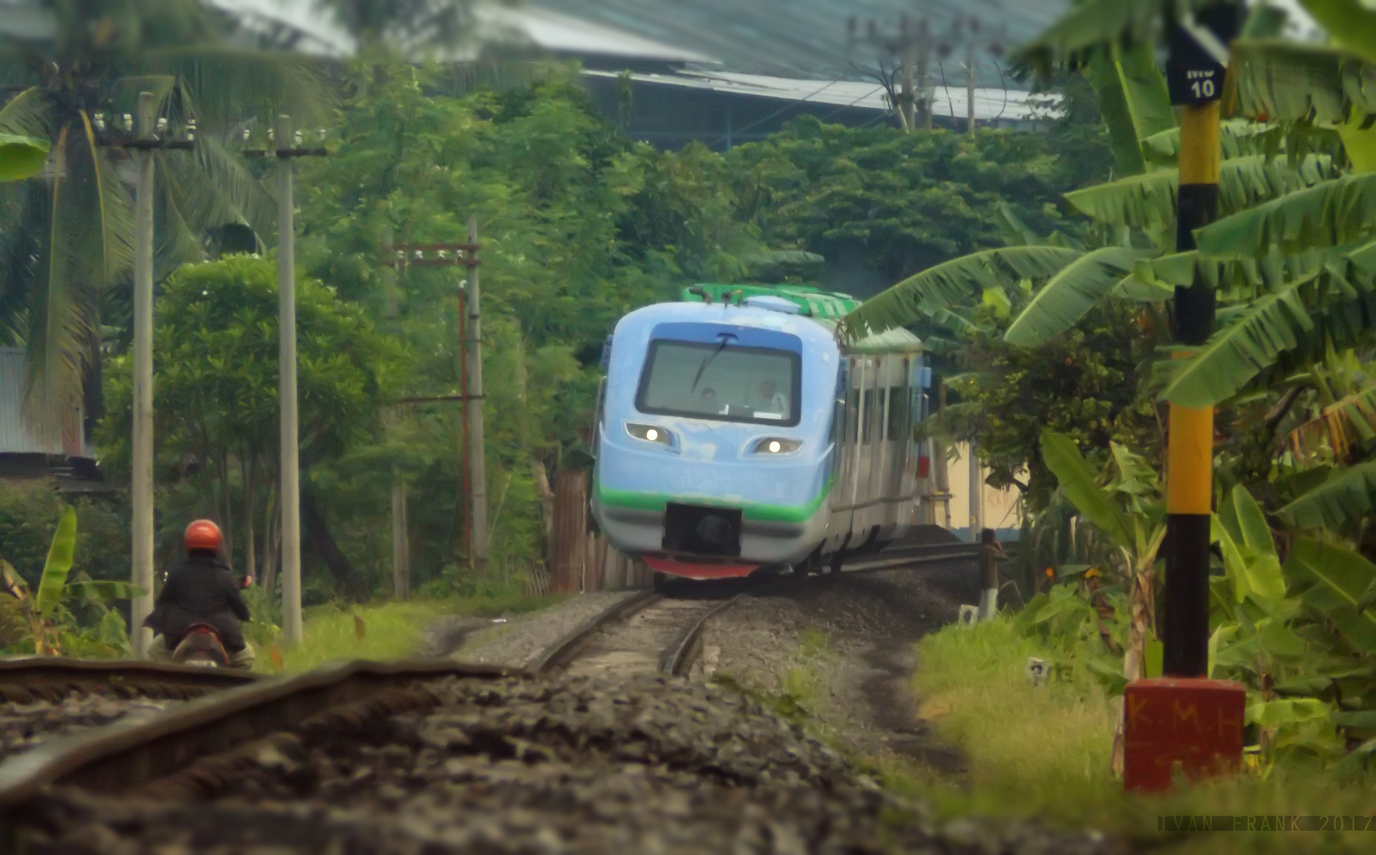 railbus kertalaya berangkat dari kertapati